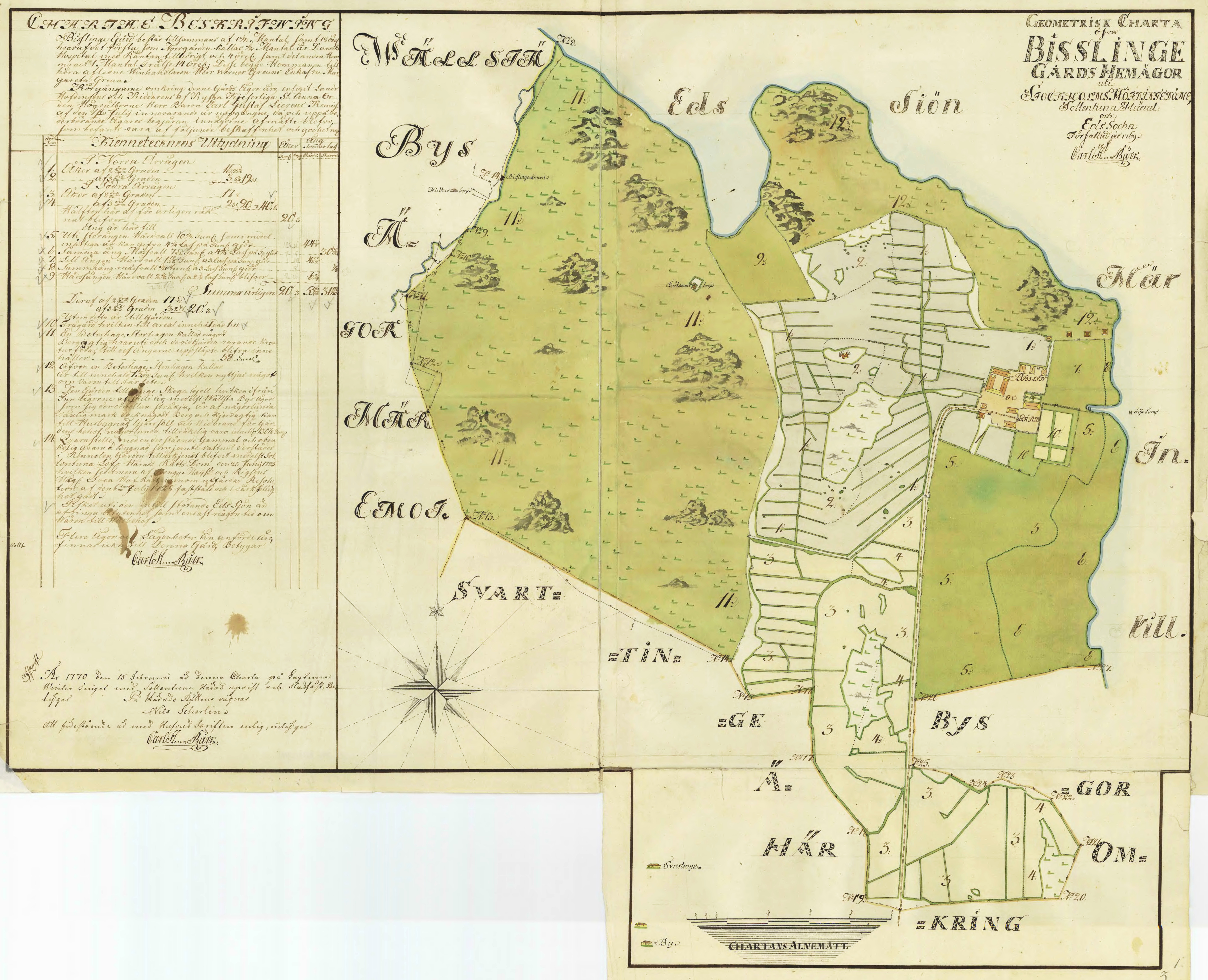 Bisslinge gårds ägor